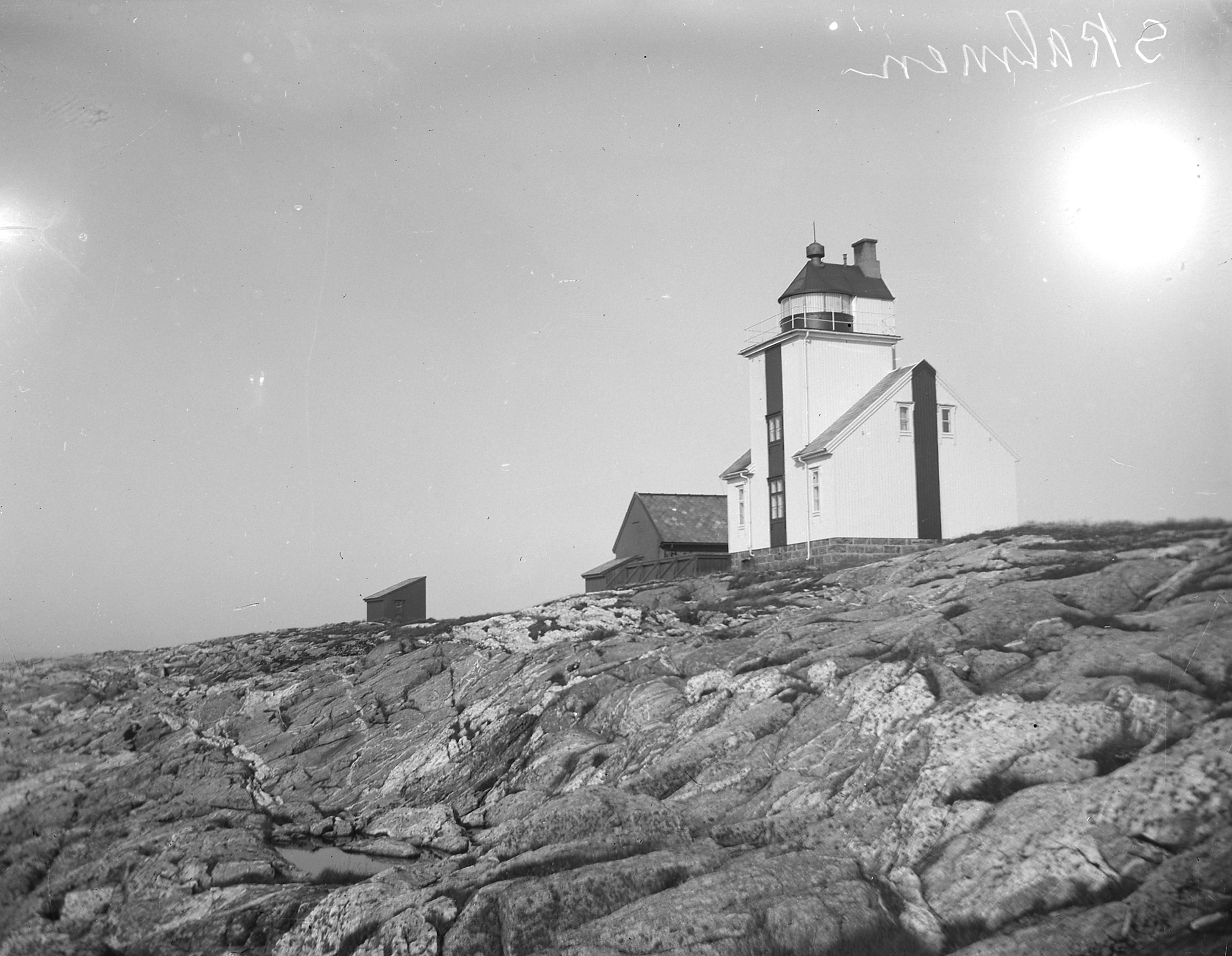 Bildet er hentet fra Arkivverket. Skalmen, Smøla Arkivinstitusjon : Riksarkivet Arkivnavn : Fyrdirektoratet Sted : Norge, Møre og Romsdal, Smøla, Skalmen Emneord: Fyr, Kyst Avbildet